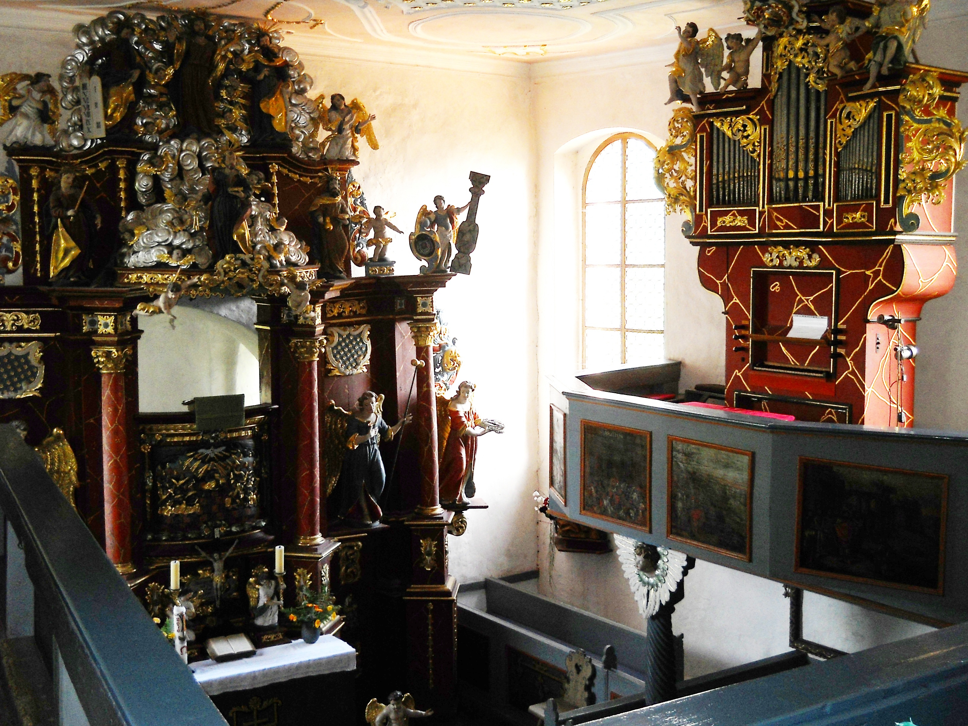 Klausstein-Kapelle bei Ahorntal in der Fränkischen Schweiz, Inneres